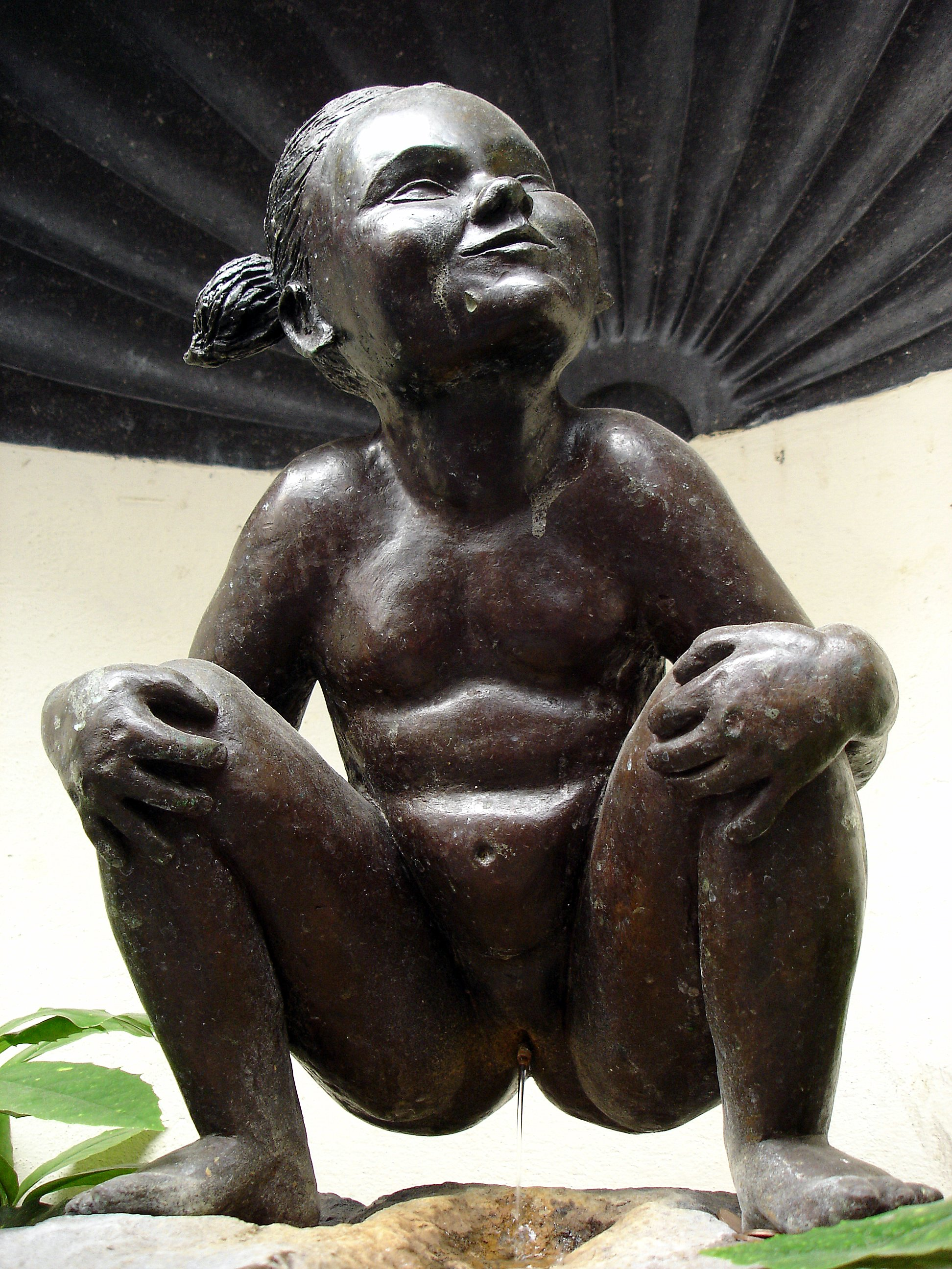 Janneken Pis by Denis-Adrien Debouvrie